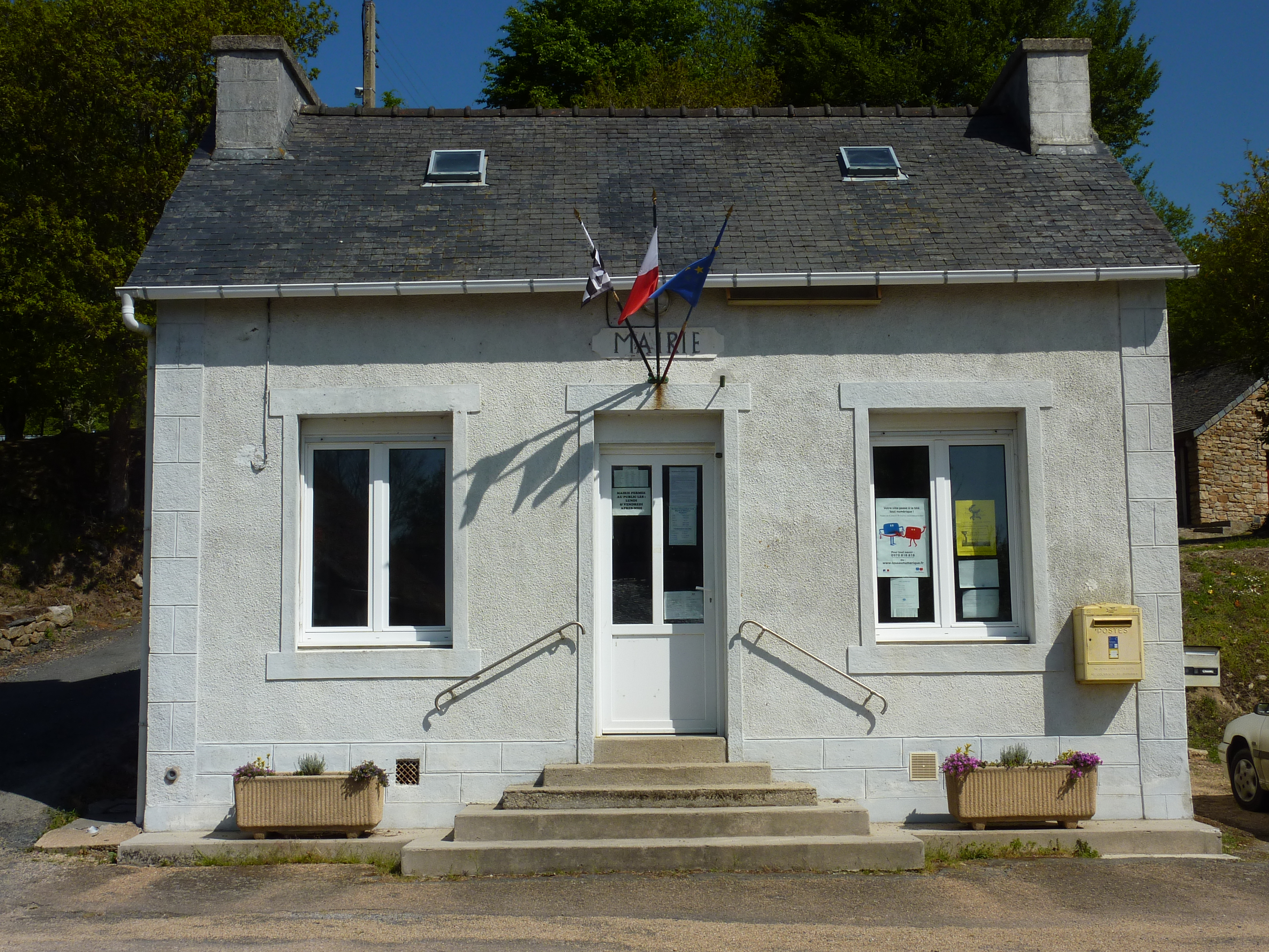 Une des plus petites mairies de France